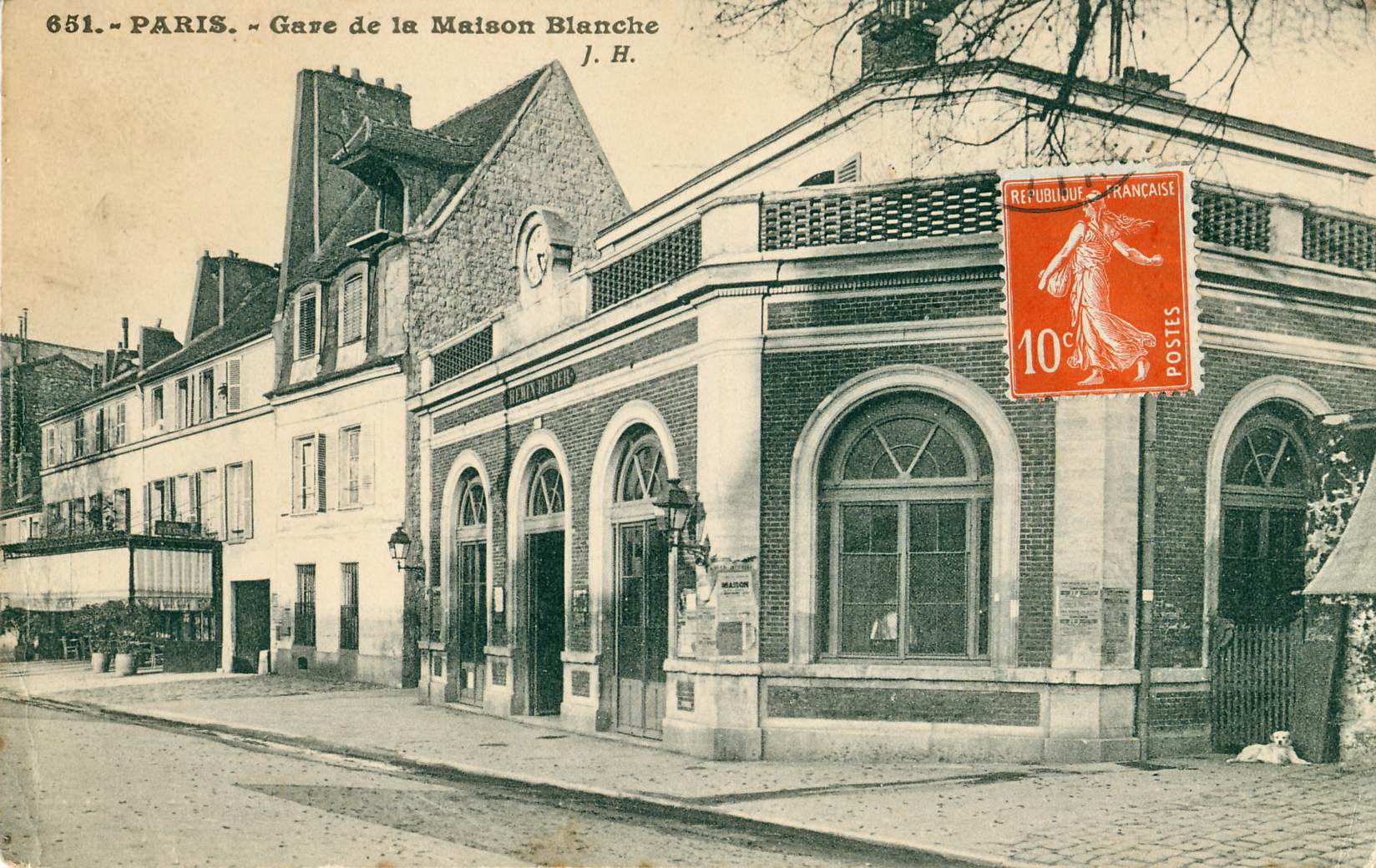 Carte postale ancienne éditée par JH, N°651Paris : Gare de la Maison Blanche (Ligne de Petite Ceinture)